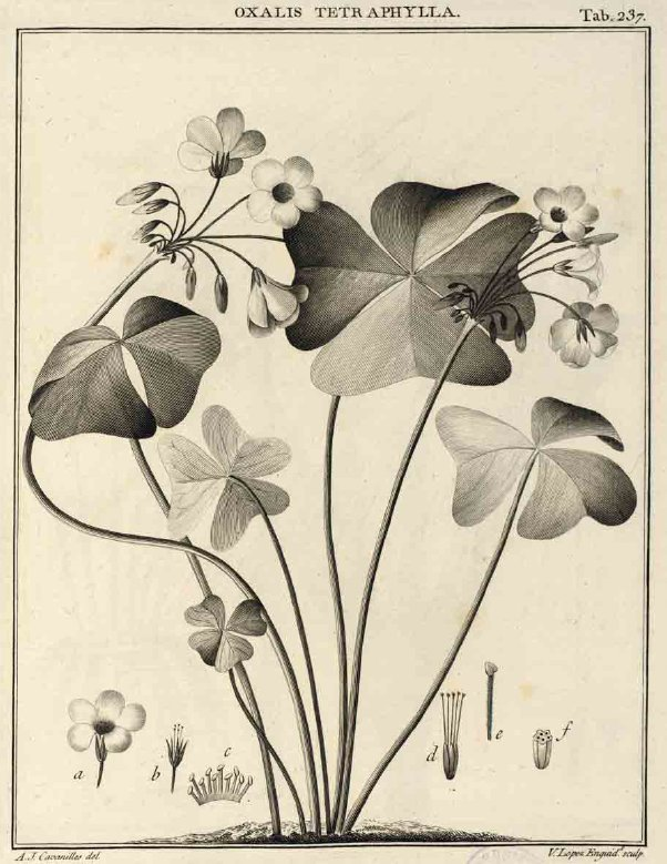 Originalillustration von Oxalis tetraphylla aus den Icones et descriptiones plantarum